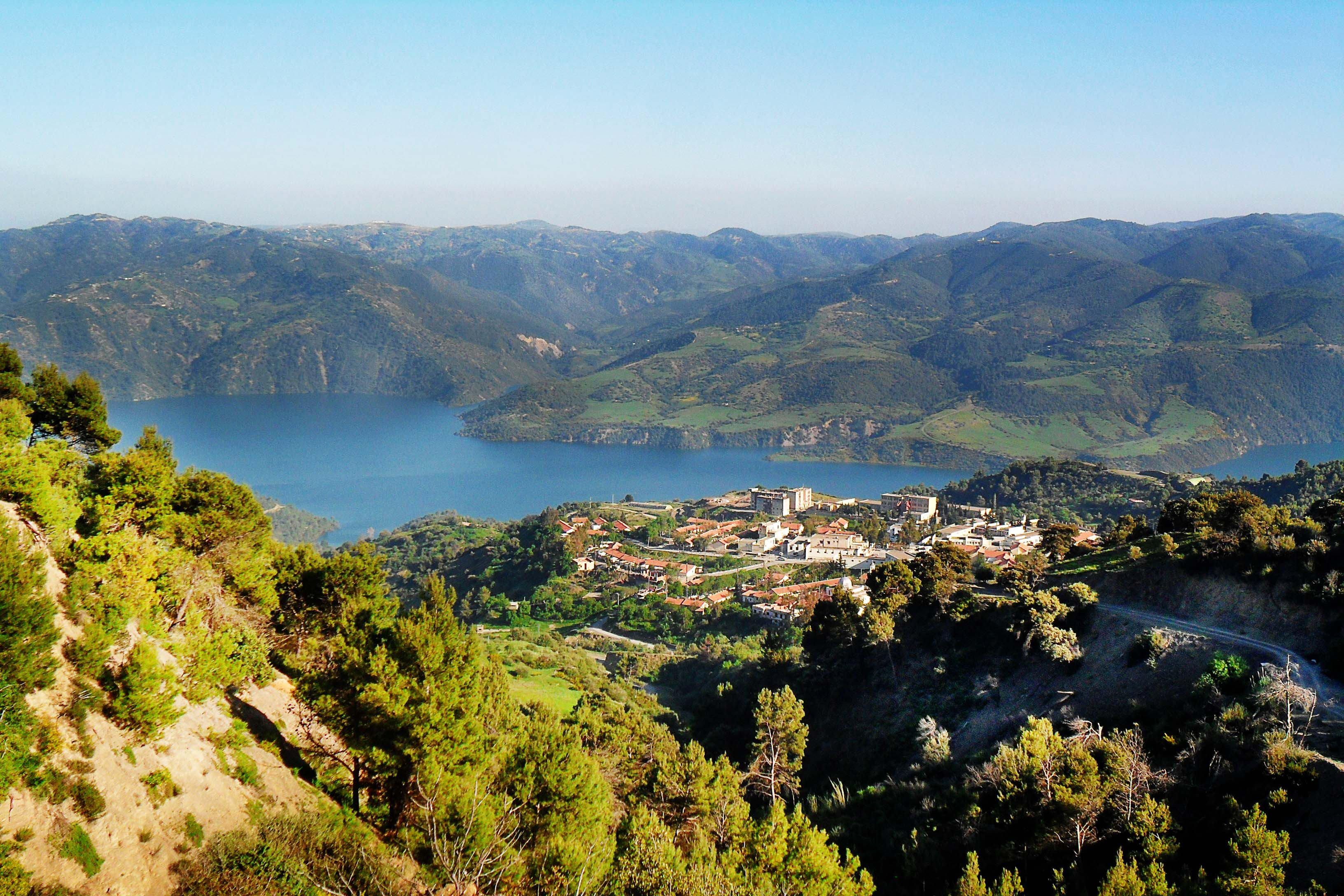 village de Zbarbar sur le barrage de Koudiet Esserdoune Palestro, wilaya de Bouira بلدية الزبربر على سد كدية اسردون، الاخضرية، ولاية البويرة